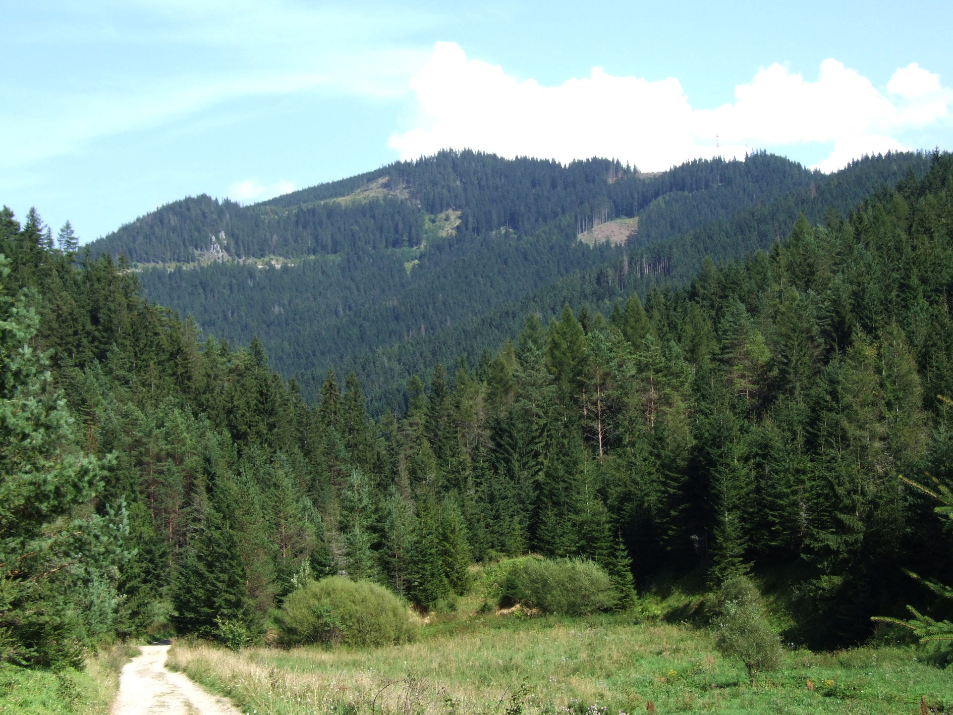 Golica Huciańska i po jej prawej stronie Ostry Wierch Kwaczański). Widok z doliny Borowianki